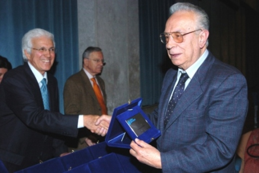 Autore: MARIO DE RENZIS Descrizione: 50° di giornalismo professionistico